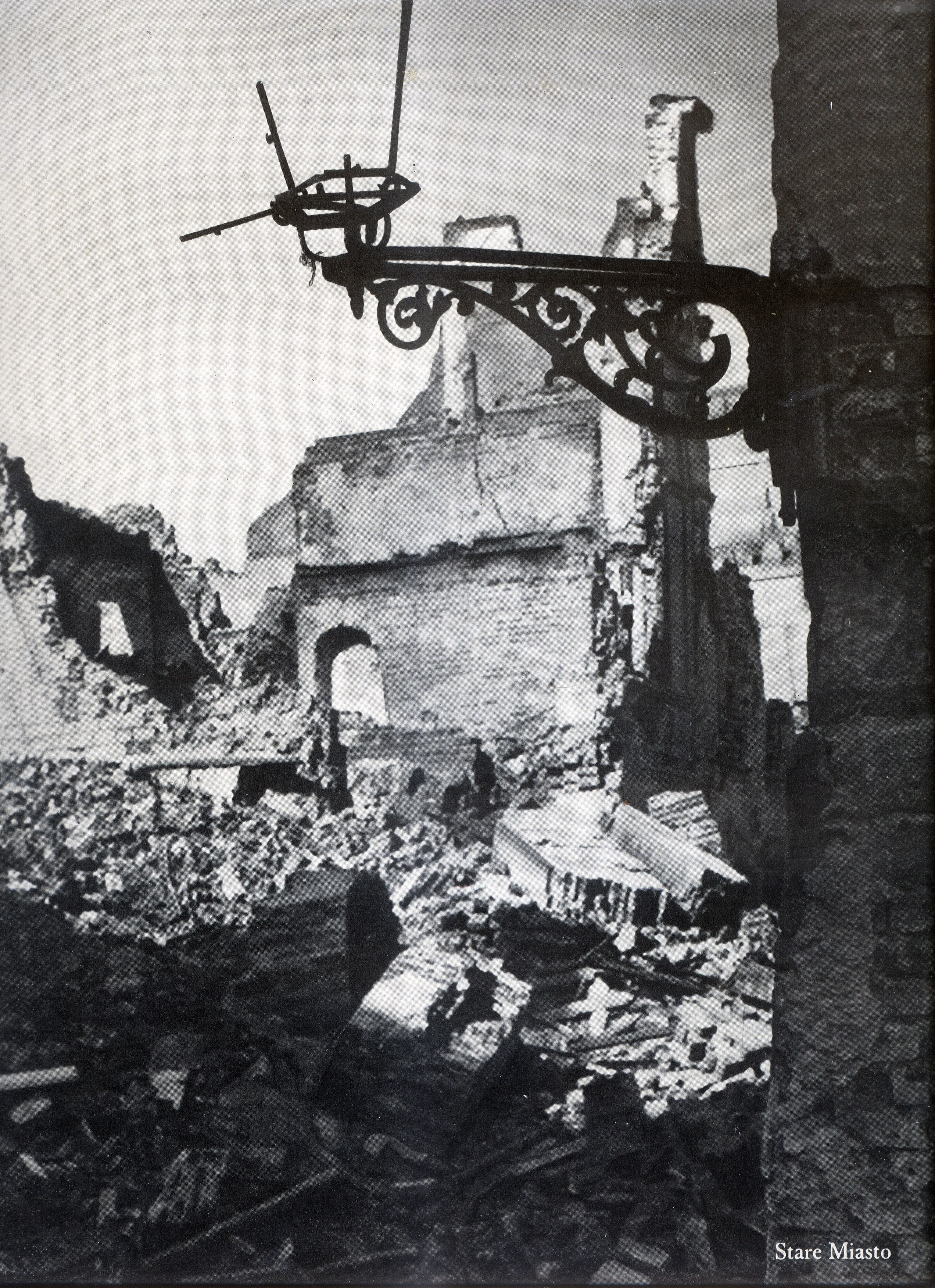 Warszawa, Stare Miasto: widok z rynku na ulicę Zapiecek.